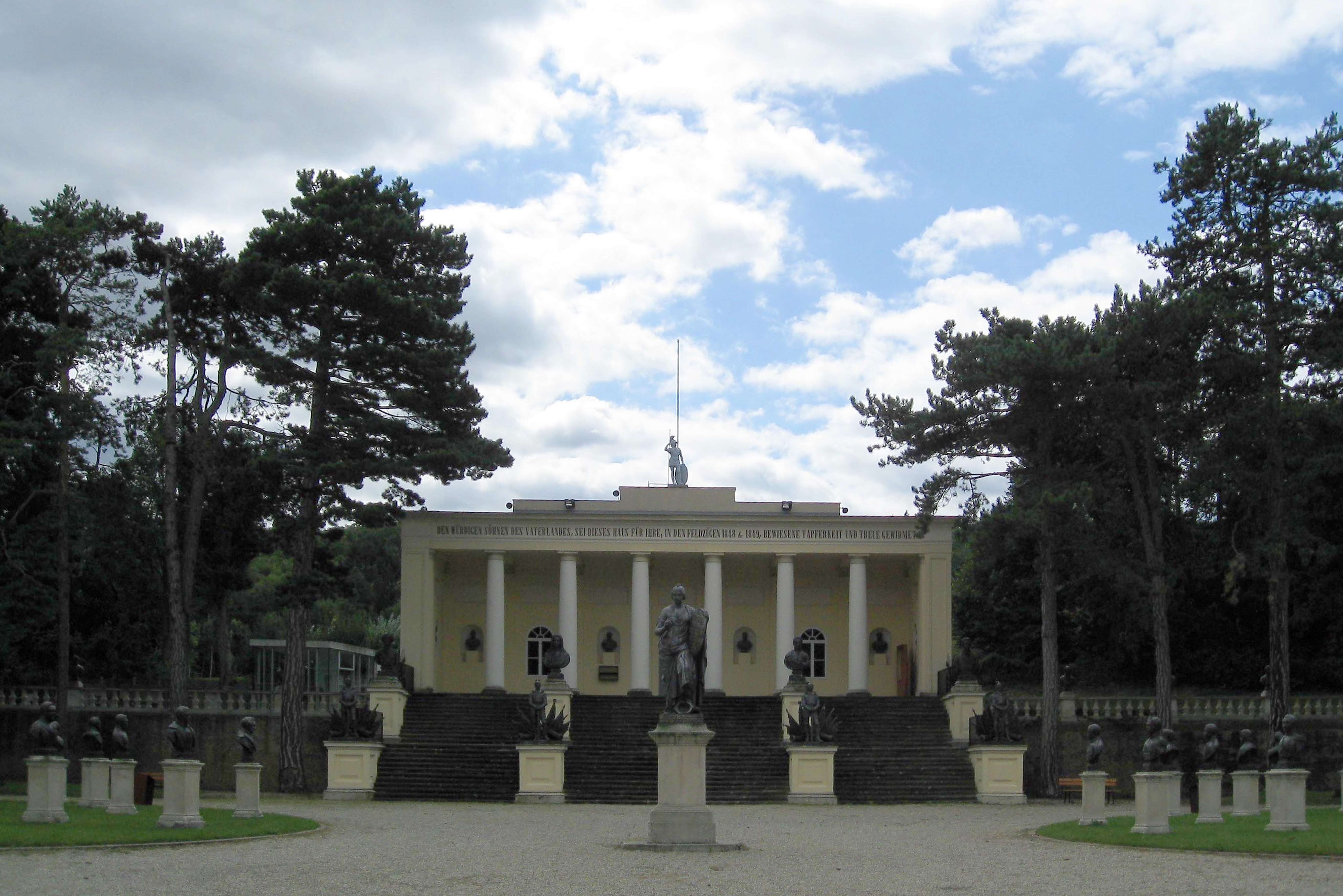 Denkmalsregion Heldenberg, N.Ö.: Figuren und Büsten aus Zinkhohlguss in Sandform hergestellt, schwarz gestrichen.